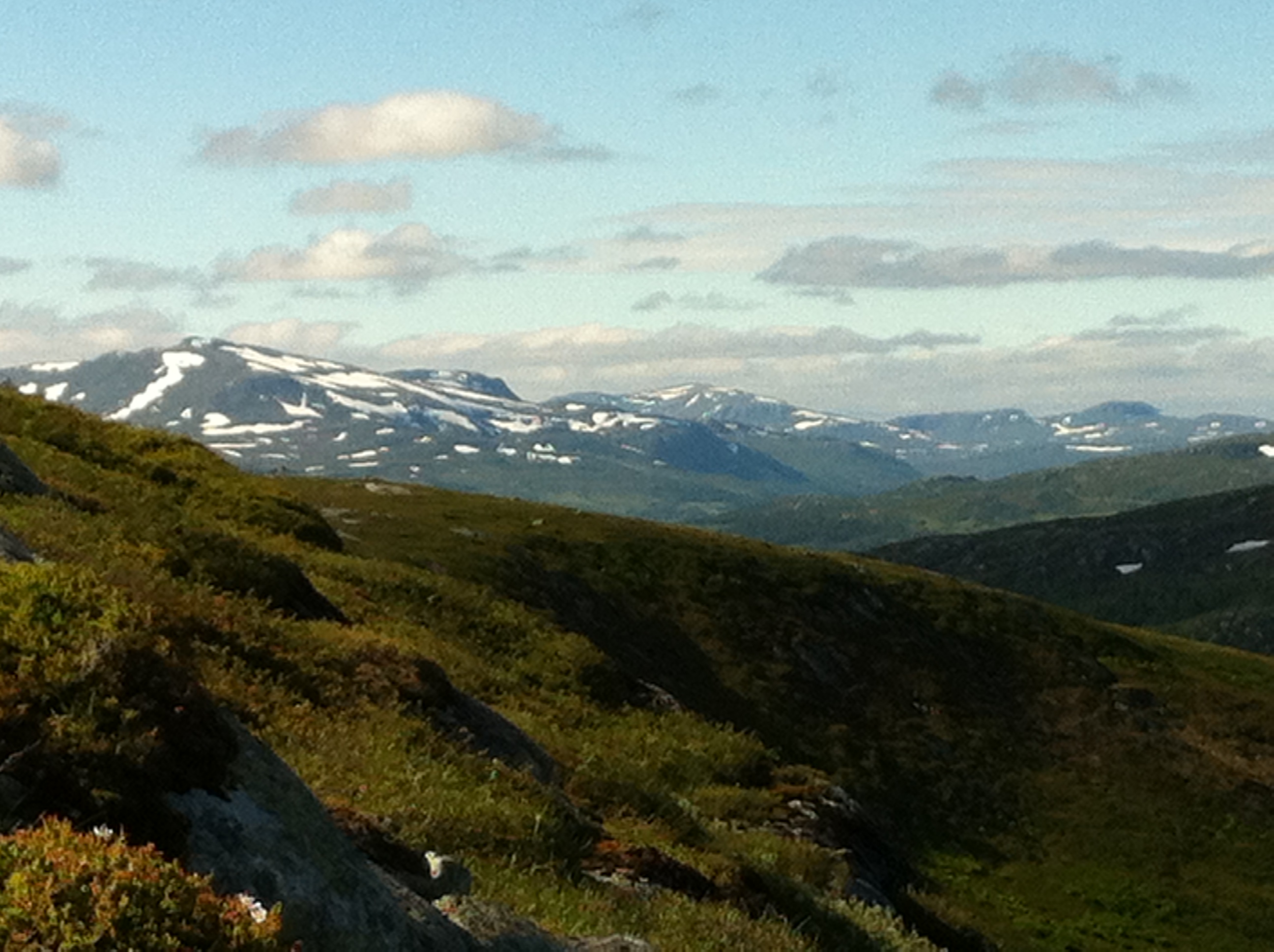 Vy från Oldklumpen, Offerdals socken, Krokoms kommun, Jämtlands län.